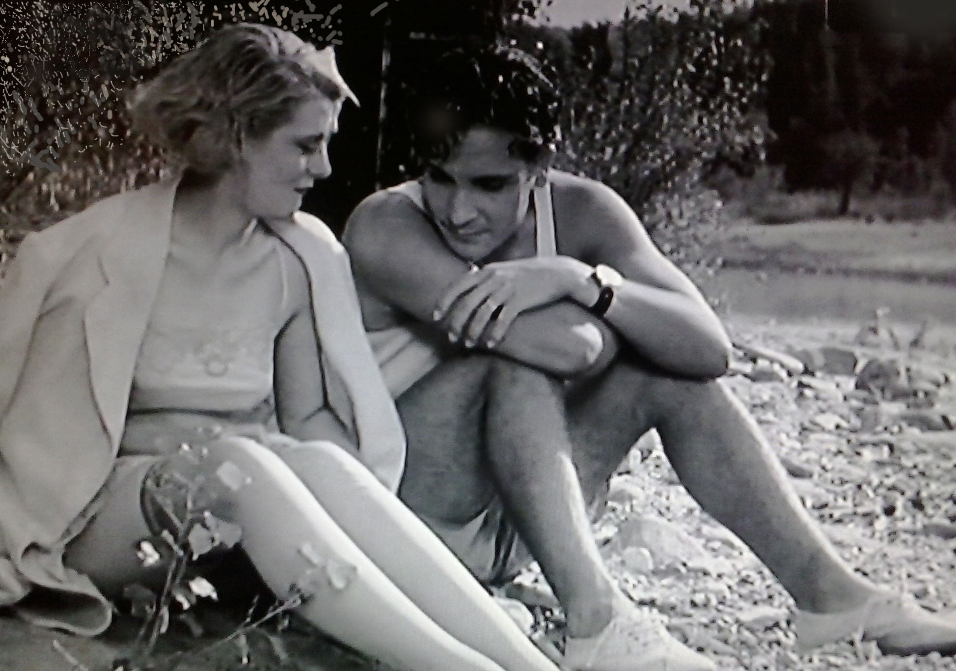 Lina Gennari e Marcello Spada in "Treno popolare" (Matarazzo, 1933)